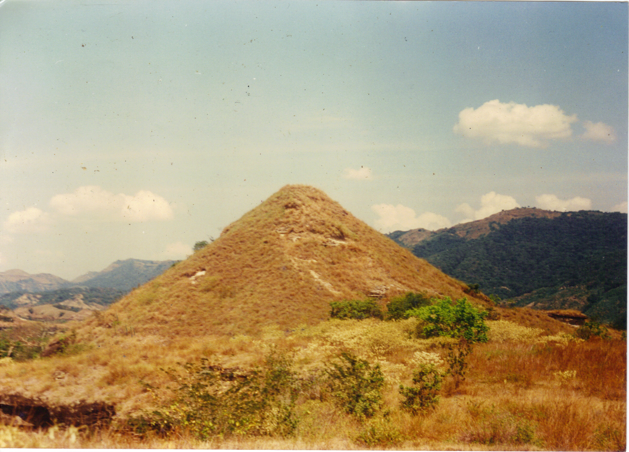 Única pirámide en Colombia, ubicada en Armero-Tolima.